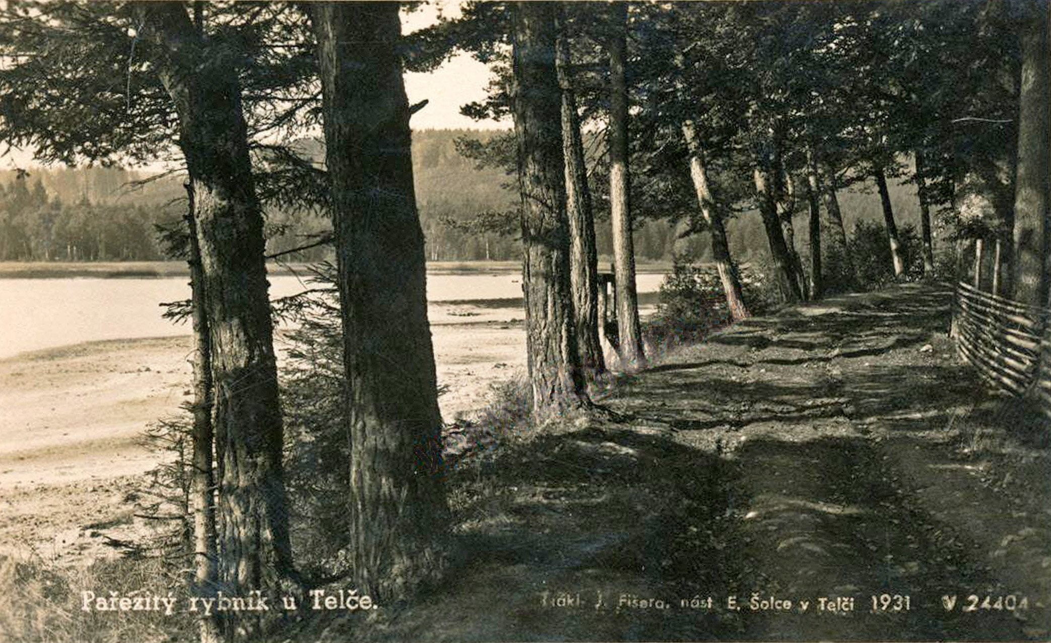 Velký pařezitý rybník na pohlednici ze 30. let. „Několik metrů jen, abychom spatřili perlu tohoto zátiší, Pařezitý rybník… Stačí prochoditi žárné letní dopoledne na veliké té hrázi vroubené staletými buky, stačí usednouti na některý z vysedlých balvanů, když slunko chýlí se k západu, a rozteskniti se zatikáním osamělého ptáka, zarmoutiti rybou, která marně zatouží k slunci a k obzoru nebes a vymrštivši se ve svých letech, zase nucena jest zůstati dole v hlubině, stačí uslyšeti zvonky pasoucích se na kraji lesů stád, stačí jedenkráte vrhnouti se bez bázně v náručí tvých studených, ach, i v žáru letním tak svůdně studených vln, a nechat se unášeti jejich vděky a doplavati kamsi daleko, daleko až ku středu rybníka – malého horského jezera! – daleko ku středu, odkud lze rozeznat pouze kontury hráze a hor, a modro nebes míti nad hlavou a děsnou hloubku vodní pod sebou: a potom člověk nezapomíná, nezapomene, a vždy po tobě se rozteskní.“ (Lidové noviny, 27. ledna 1901)